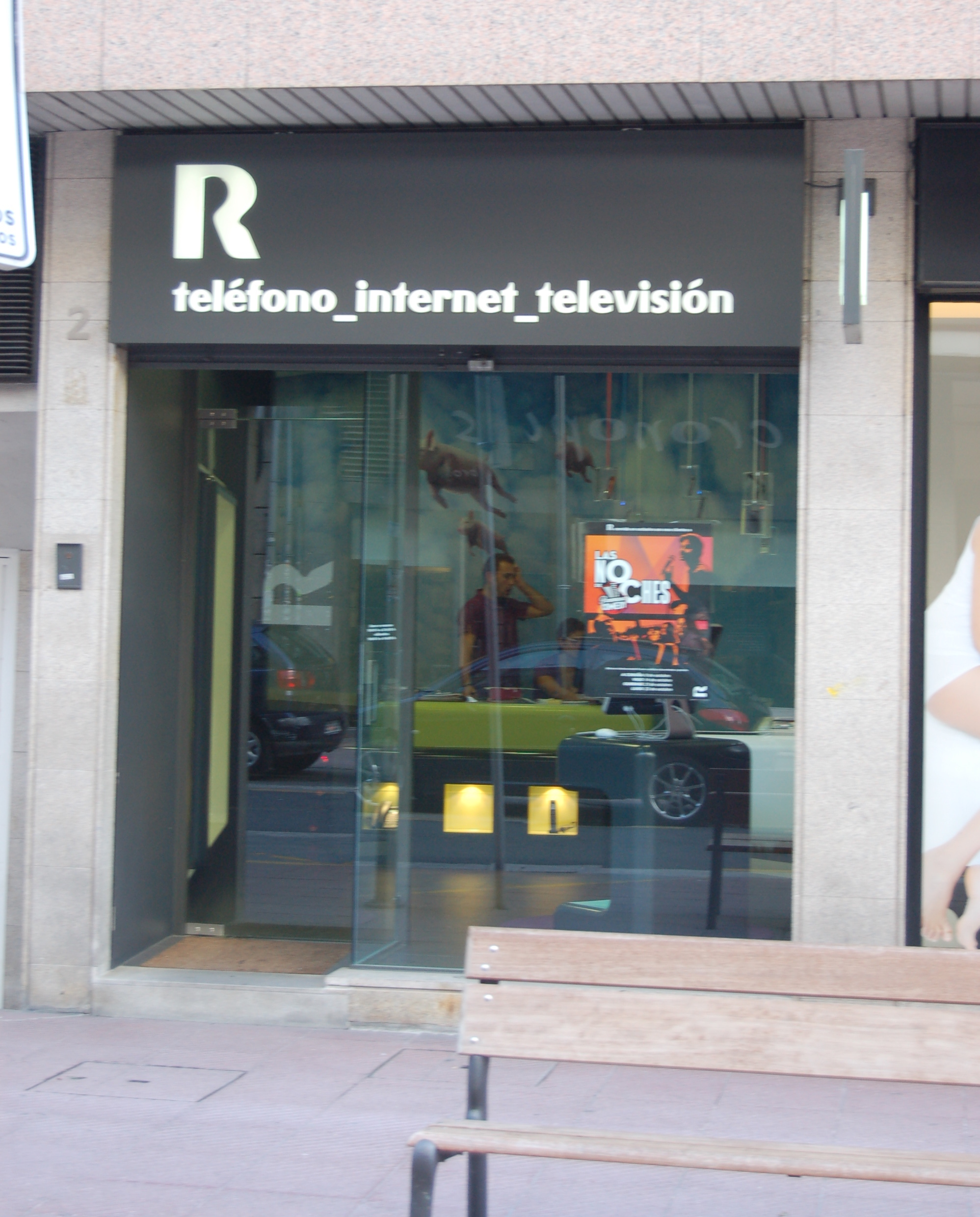 Tenda de R na rúa Frei Juan Navarrete de Pontevedra